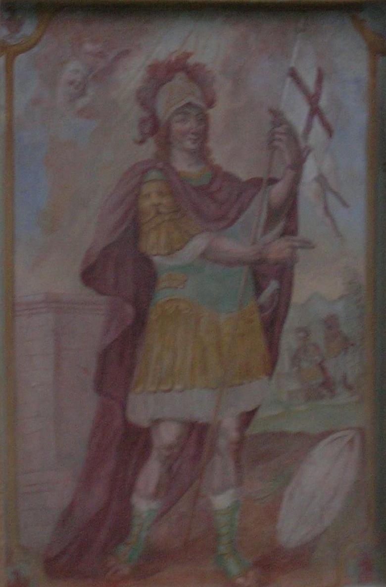 San Costanzo martire (Saint Constantius), dipinto del XII sec., sulla facciata del Santuario di San Costanzo al Monte - Villar San Costanzo (Cuneo, Piemonte, Italy)